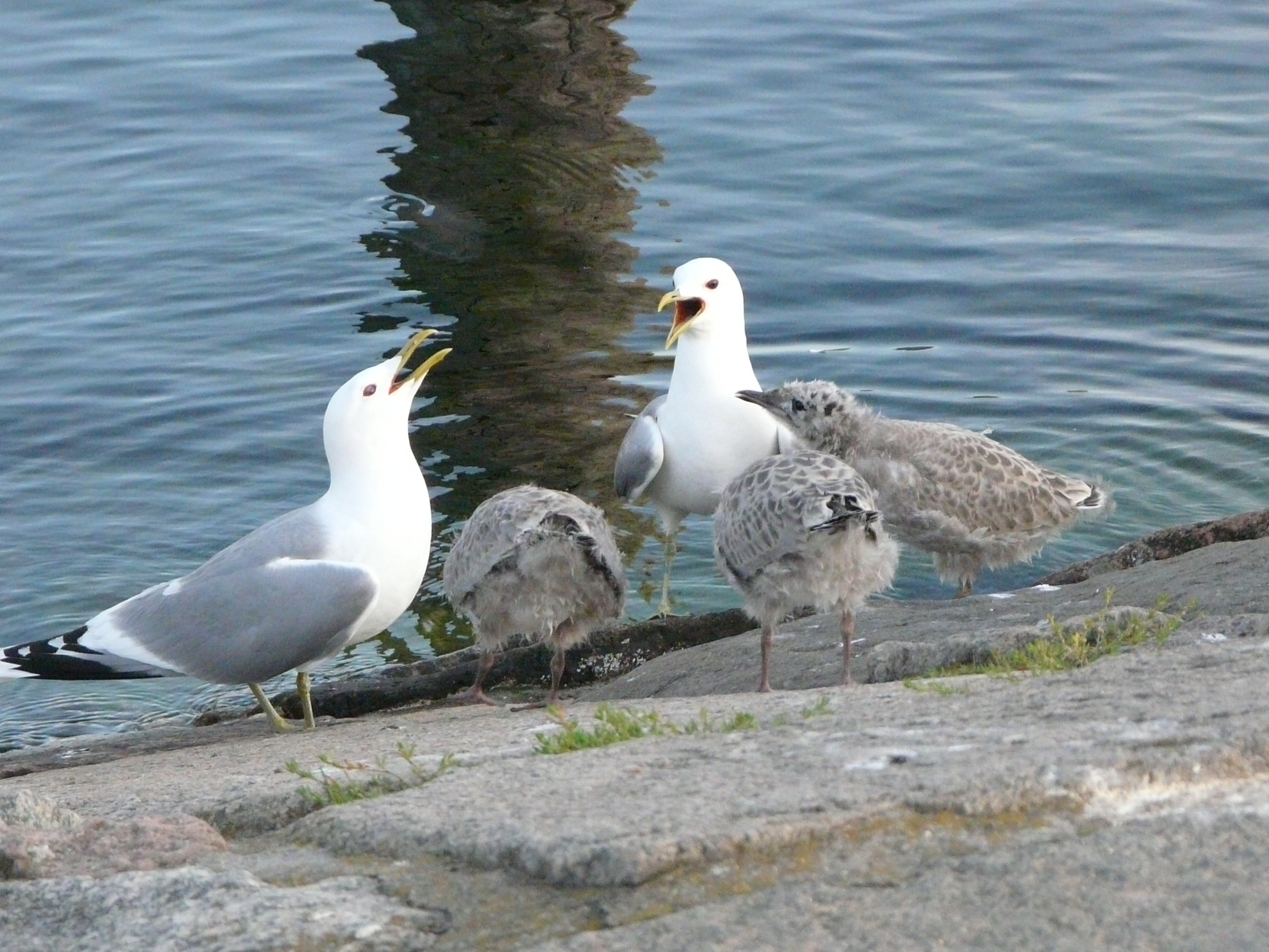 Möwen: Elternpaar & Jungvögel